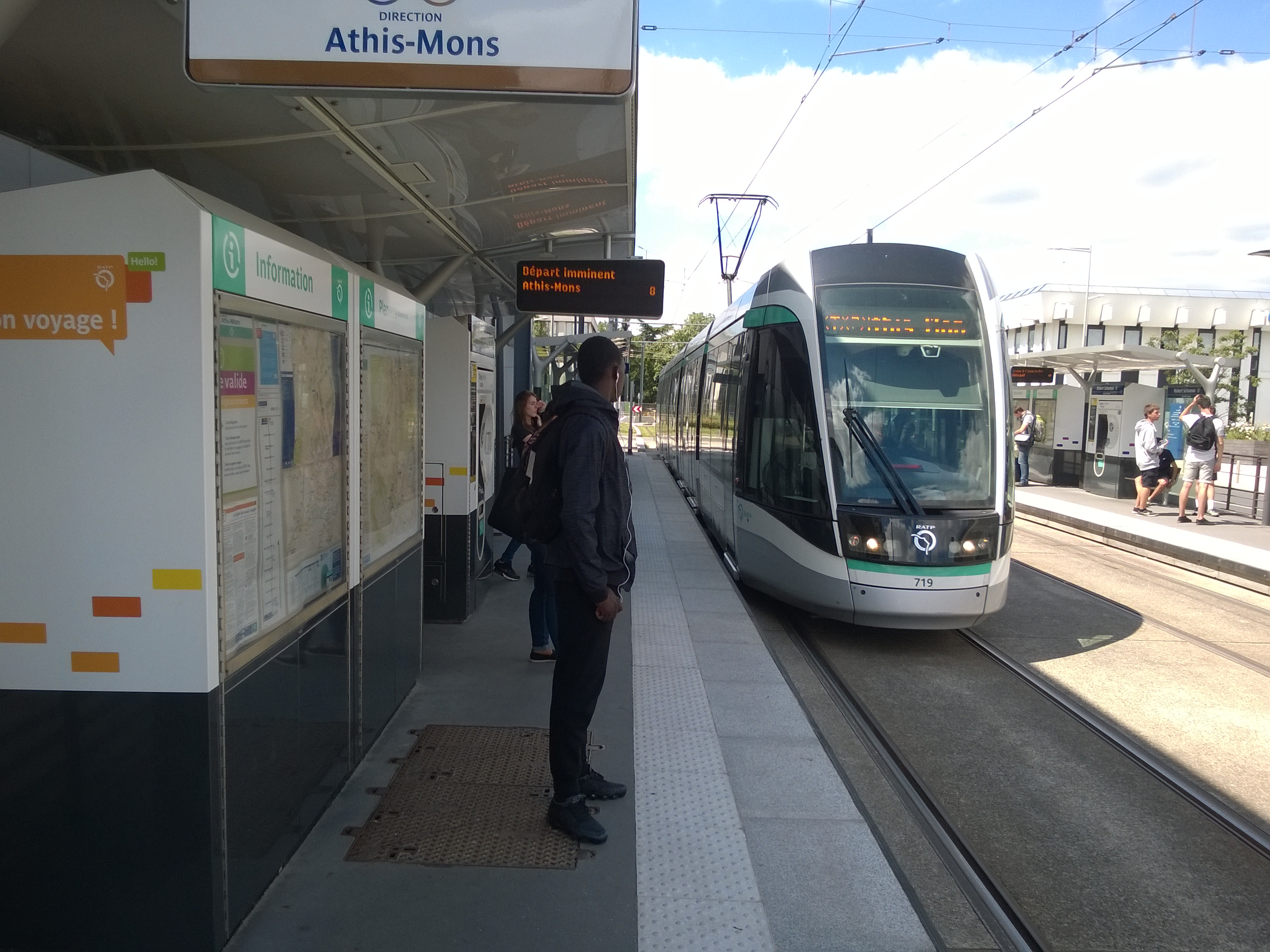 Station Robert Schuman, Rungis (département du Val-de-Marne, France).Citadis 302 pour Porte de l'Essonne.